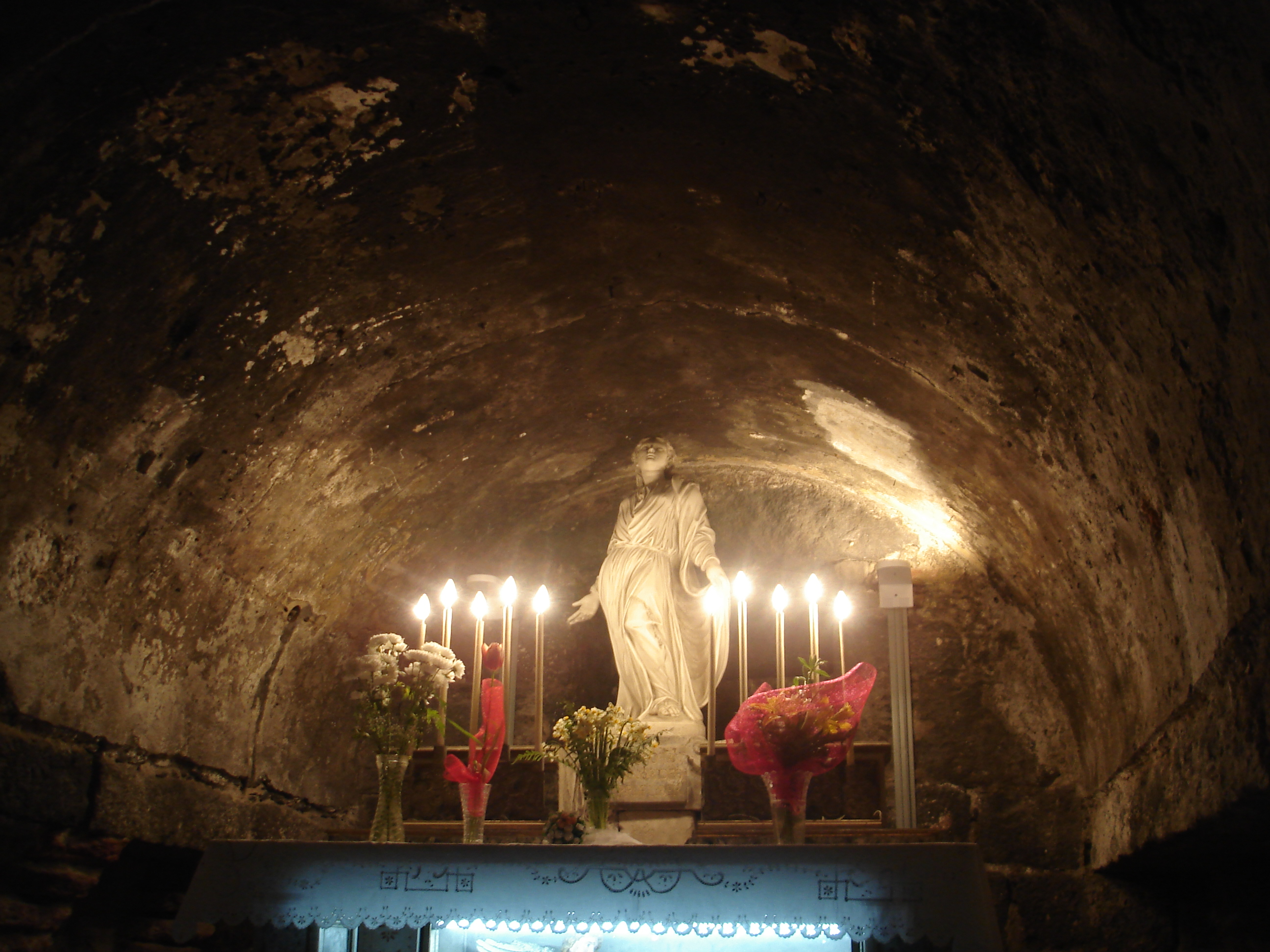 Interno della cella del Carcere